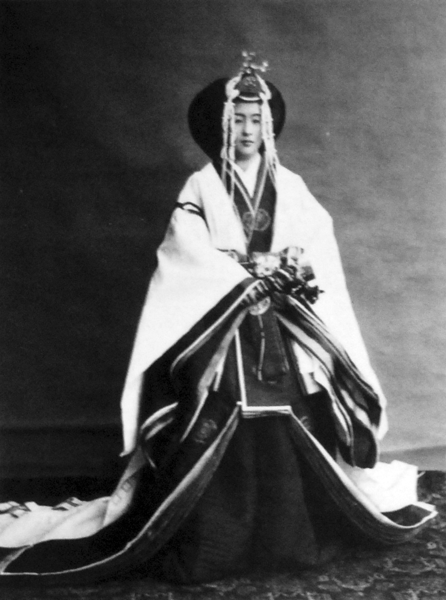 梨本宮妃伊都子(Nashimoto-no-miya Itsuko)。大正天皇の大嘗祭(11/13)にあたって